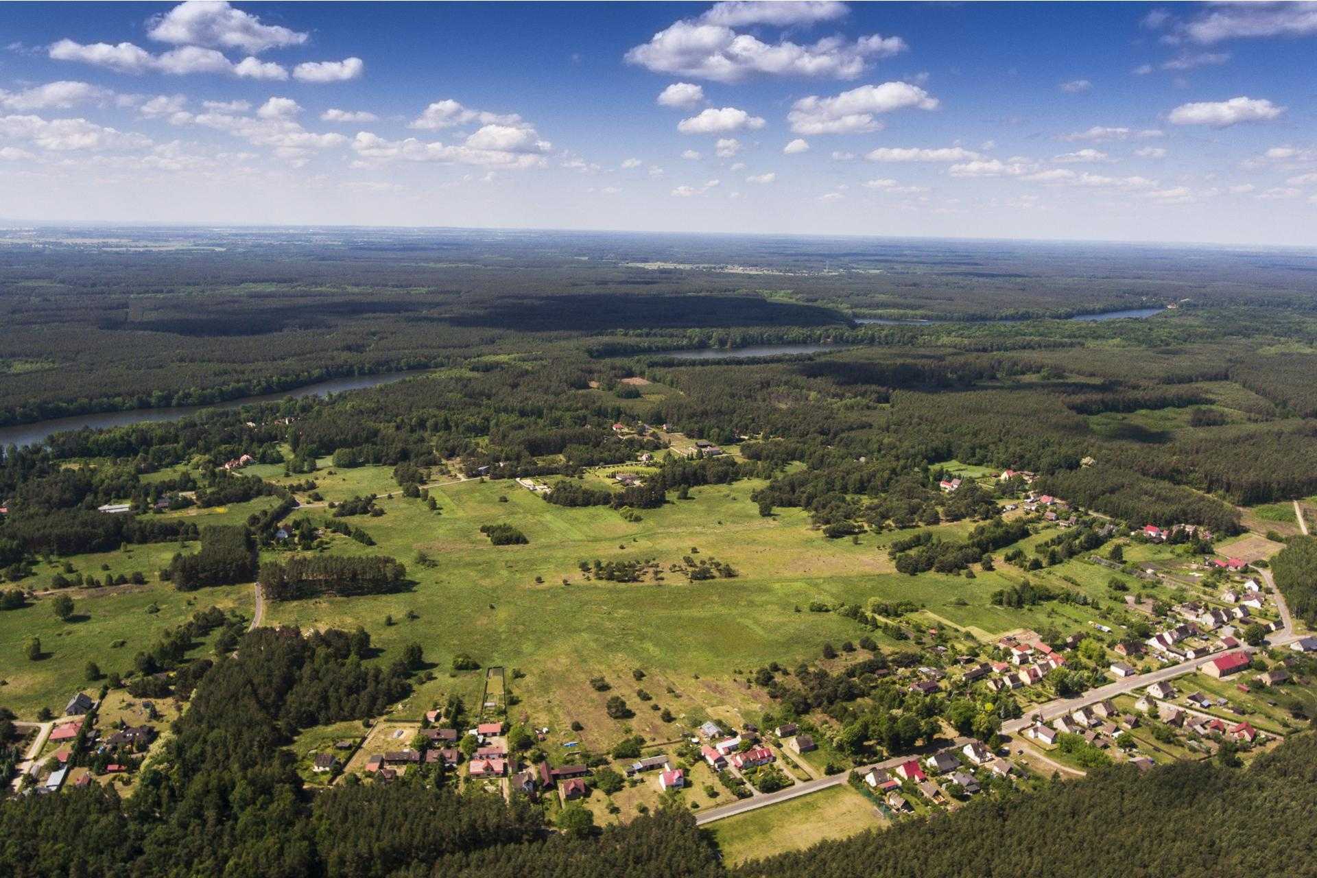 Rybakowo z lotu ptaka